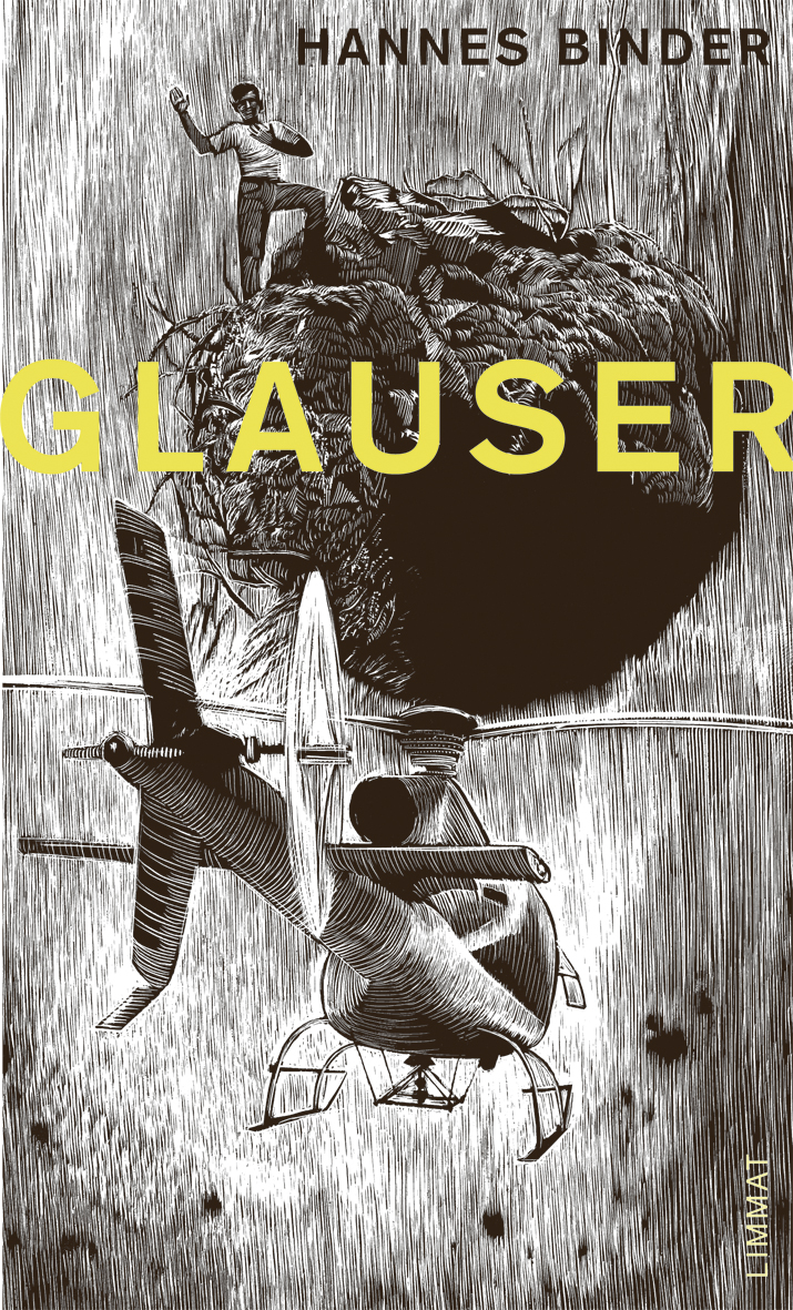 Buchcover von "Glauser" (Friedrich Glauser/Hannes Binder) in der Buchausgabe des "Limmat Verlags", Zürich 2011. Umschlagentwurf: Hannes Binder